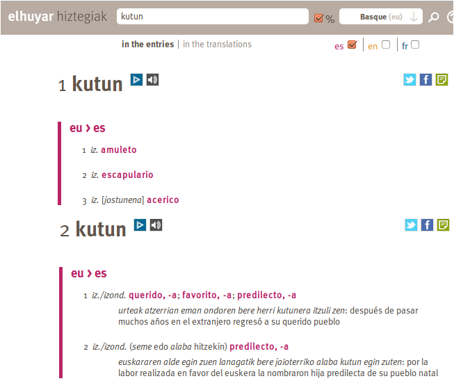 Kutun hitzak bi homonimo ditu. Lehengo homonimoak hiru adiera ditu eta bigarrenak beste bi